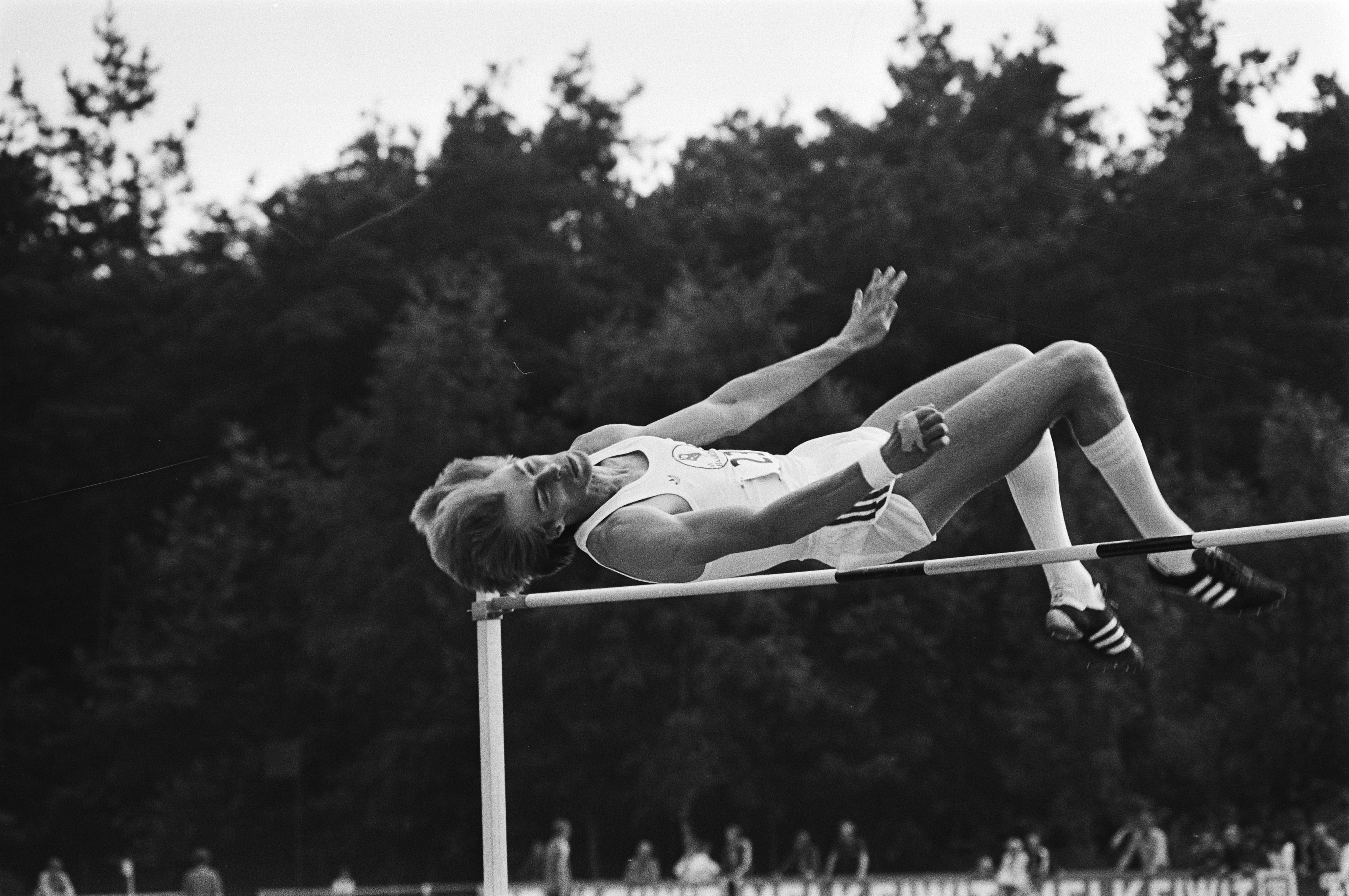 Collectie / Archief : Fotocollectie Anefo Reportage / Serie : Nederlandse Kampioenschappen Atletiek 1979, Nijmegen Beschrijving : Hoogspringer Ruud Wielart in aktie Datum : 11 augustus 1979 Locatie : Gelderland, Nijmegen Trefwoorden : atletiek, hoogspringen, sport Persoonsnaam : Wielart, Ruud Fotograaf : Suyk, Koen / Anefo Auteursrechthebbende : Nationaal Archief Materiaalsoort : Negatief (zwart/wit) Nummer archiefinventaris : bekijk toegang 2.24.01.05 Bestanddeelnummer : 930-3952